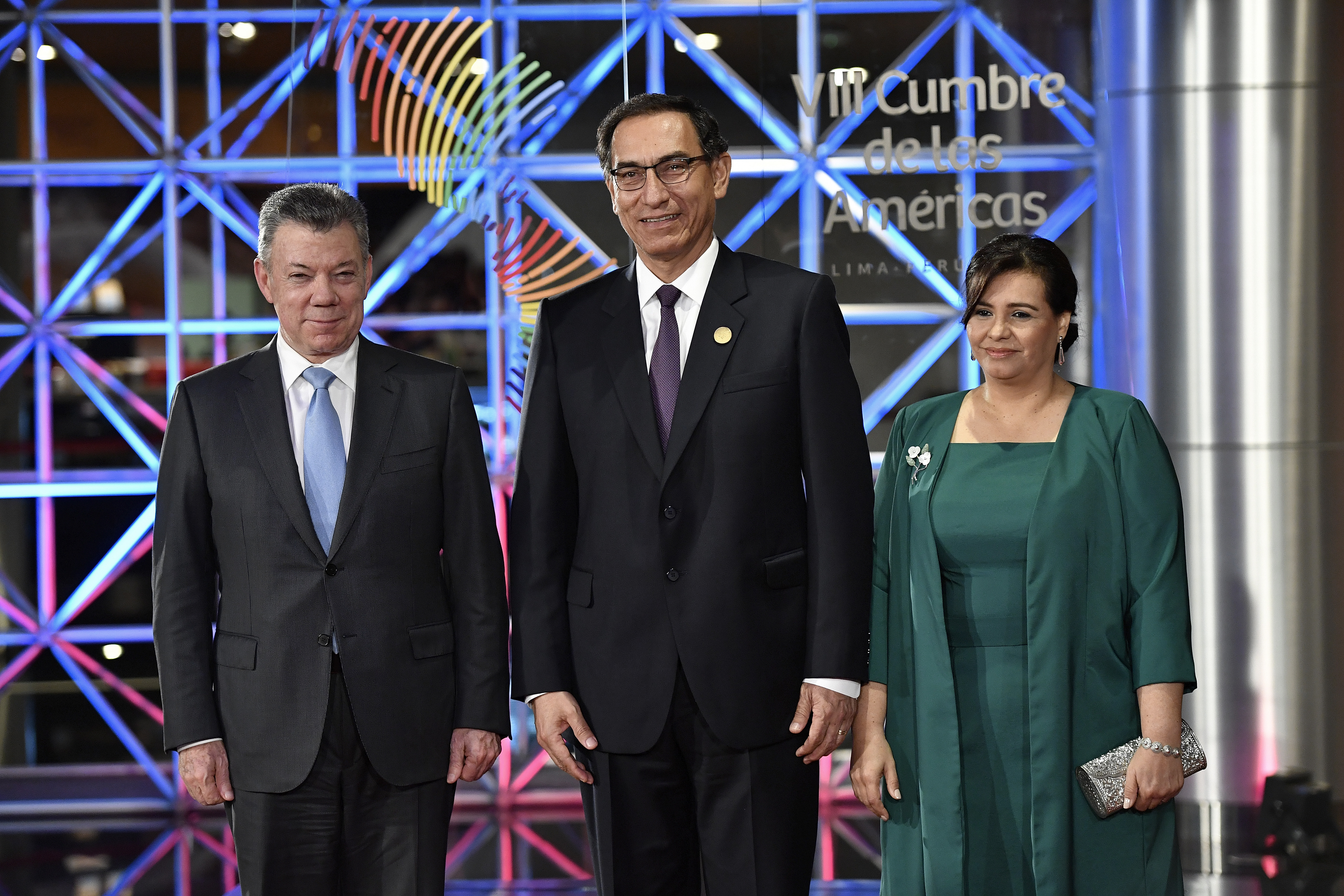 Esta noche en la sede del Gran Teatro Nacional, llegaron a los Jefes de Estado y Representantes de los países que participan en la VIII Cumbre de las Américas que fue inaugurada hoy.